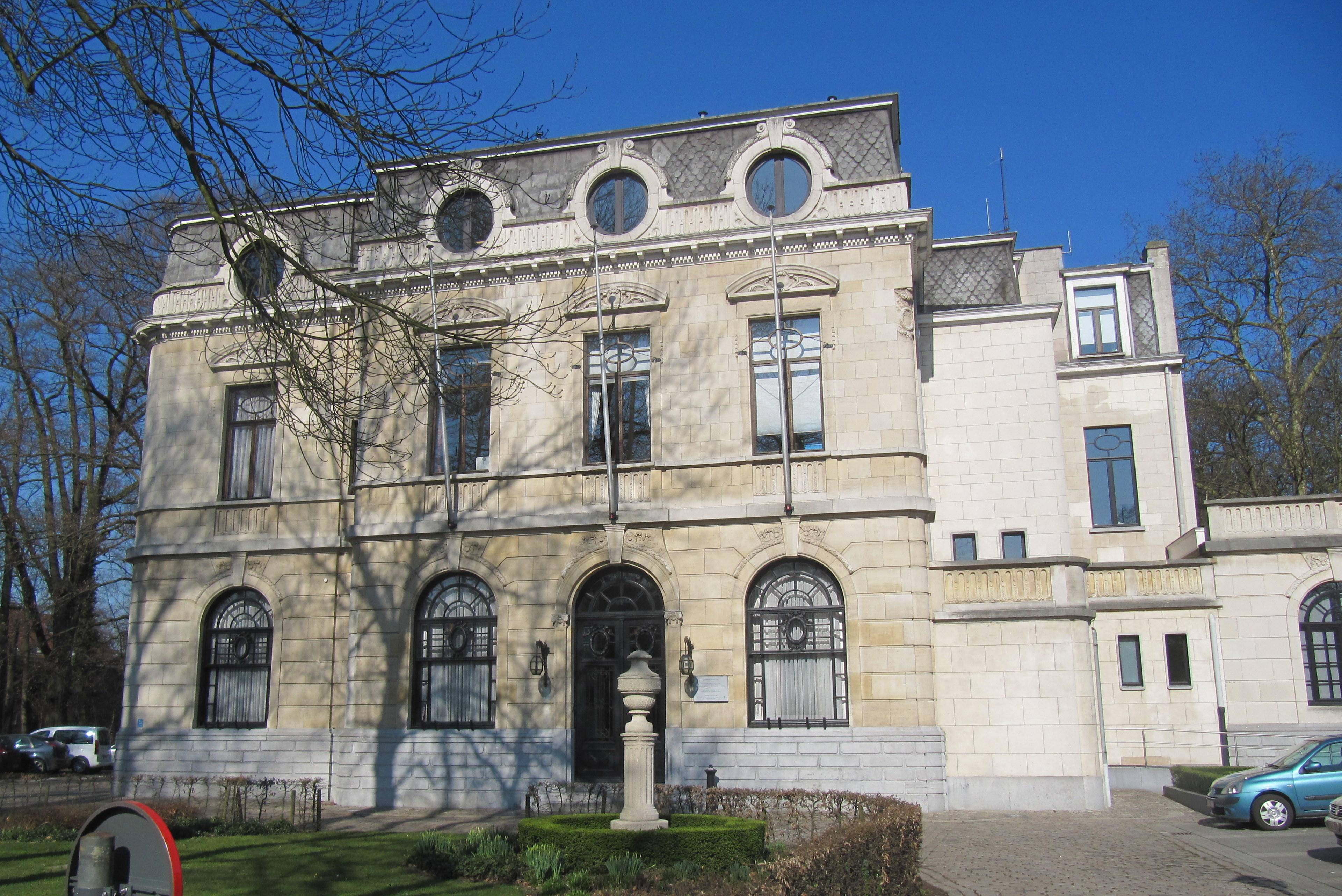 41″ N, 4° 29′ 47.69″ E